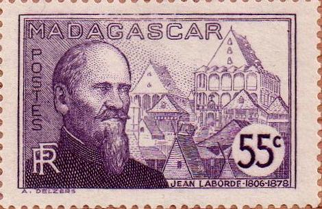 Timbre d'usage courant de 55 centimes pour Madagascar représentant Jean Laborde et une vue des palais d'Antananarivo. Yvert 200.